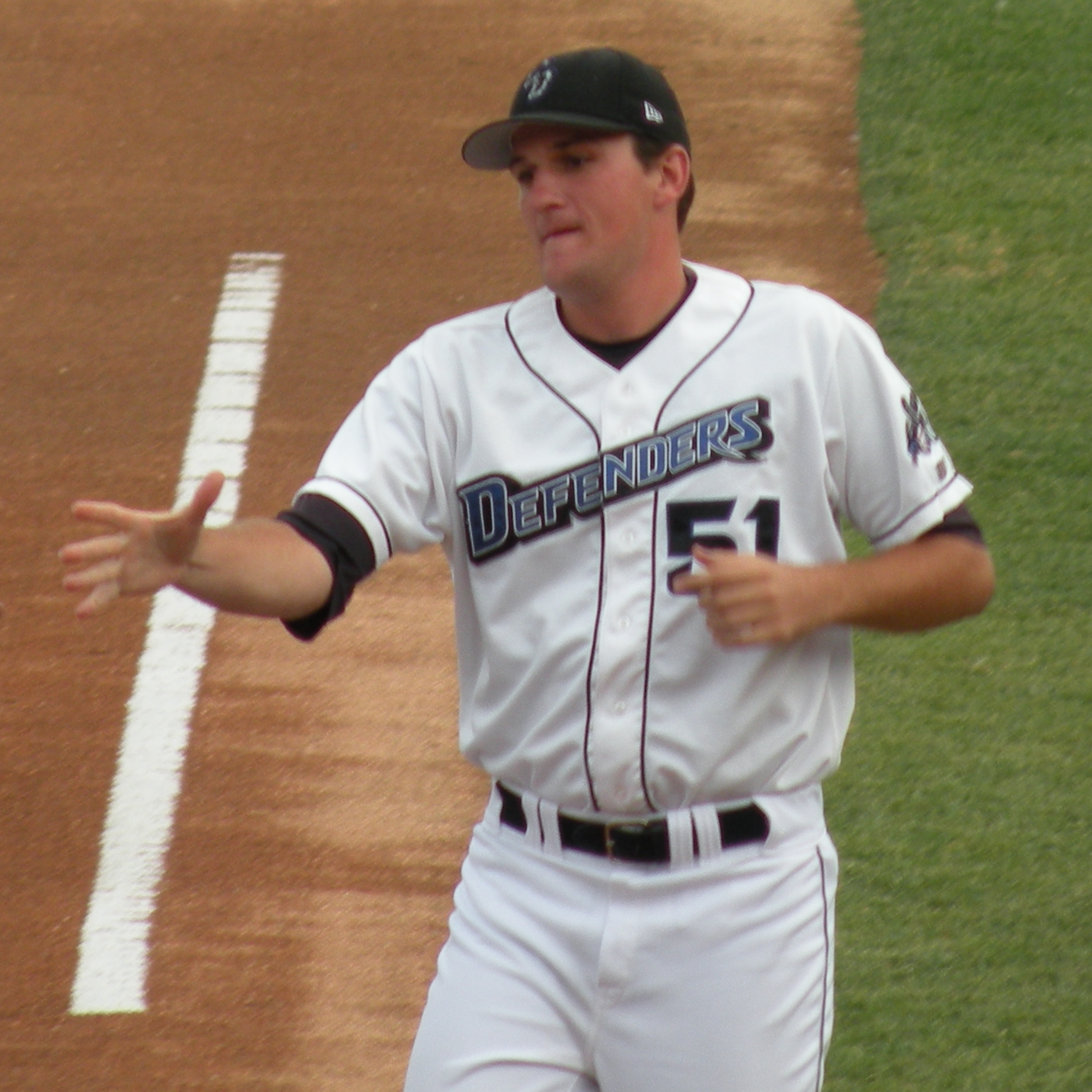 Dan Otero